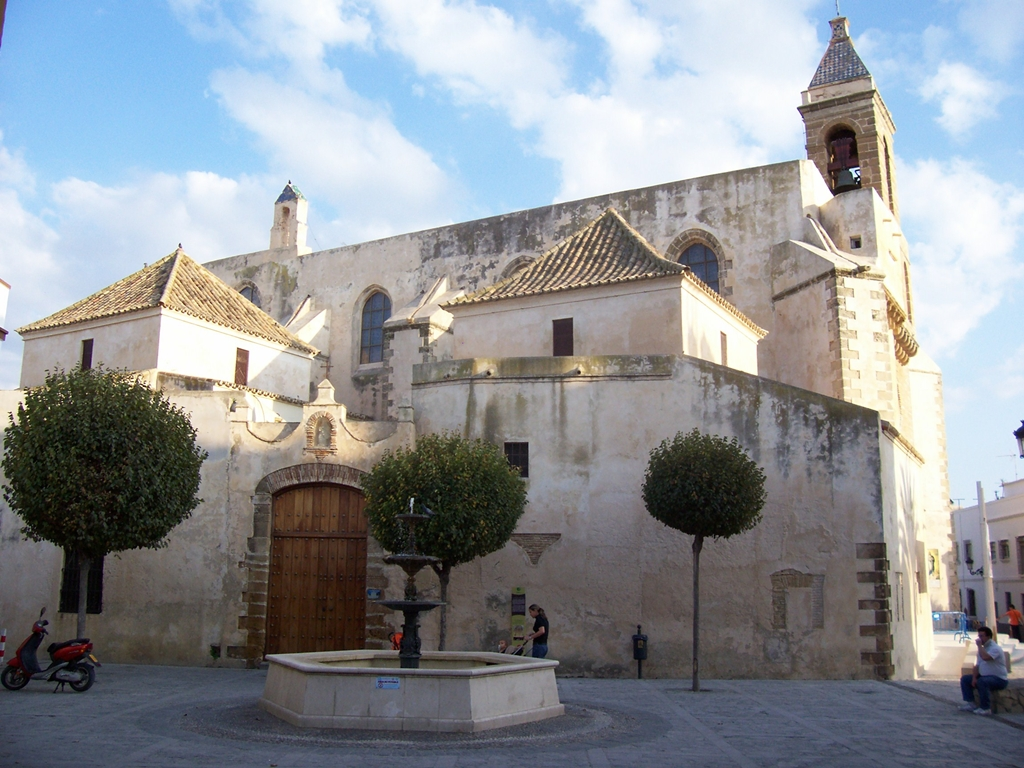 Fachada lateral de la parroquia de Ntra. Sra. de la O, en Rota-Cádiz-Andalucía-España